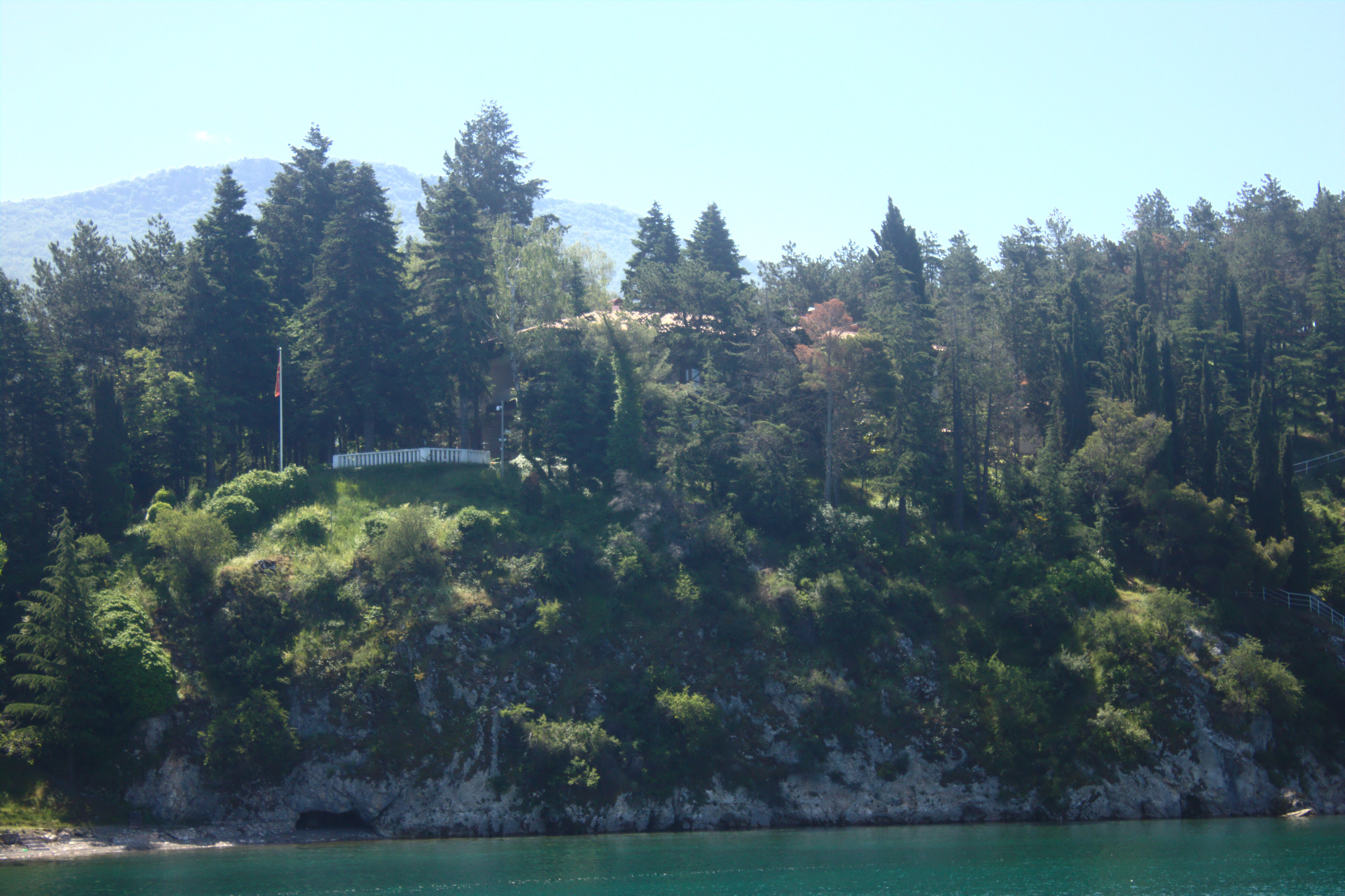 Bývalá Titova vila ve městě Ohrid na jihu Severní Makedonie